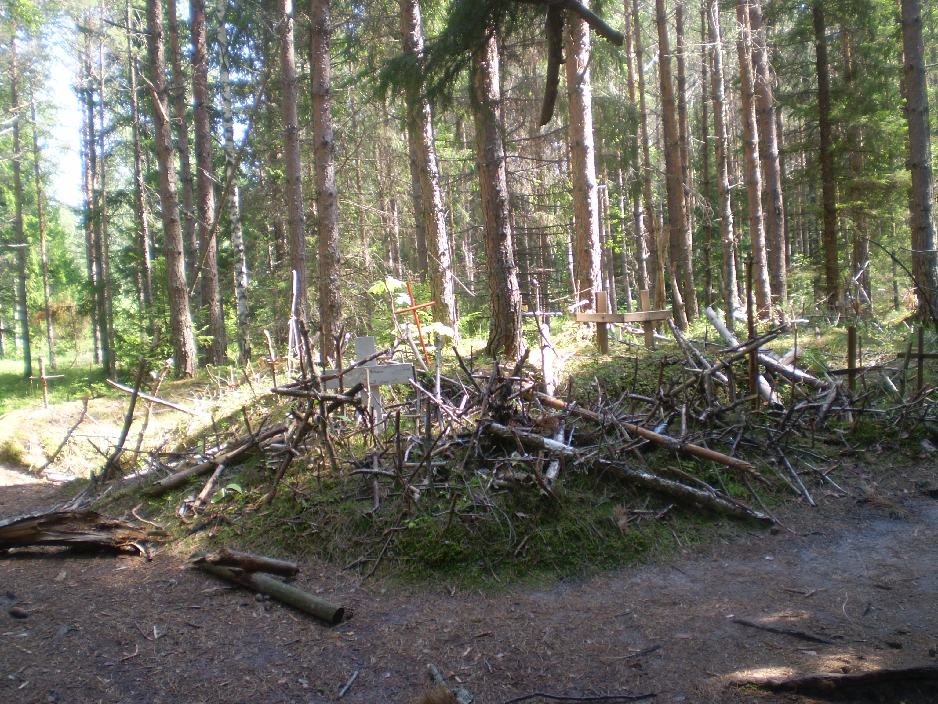 Ristimägi